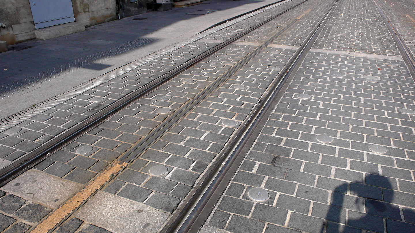 Track System APS (Line B at Musée d'Aquitaine)